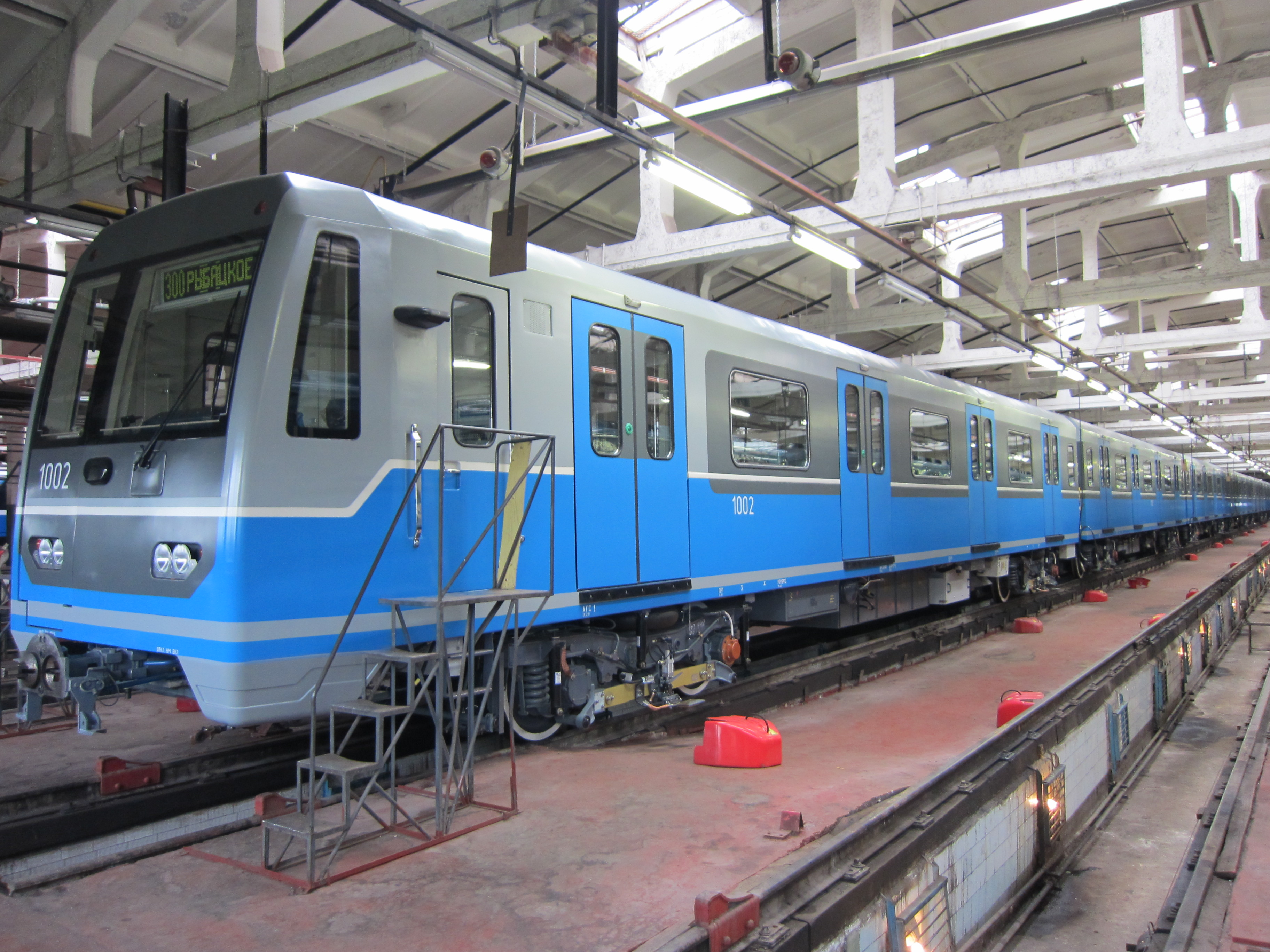 Поезд метро из вагонов 81-780 и 81-781 в электродепо Невское (Петербургский метрополитен)